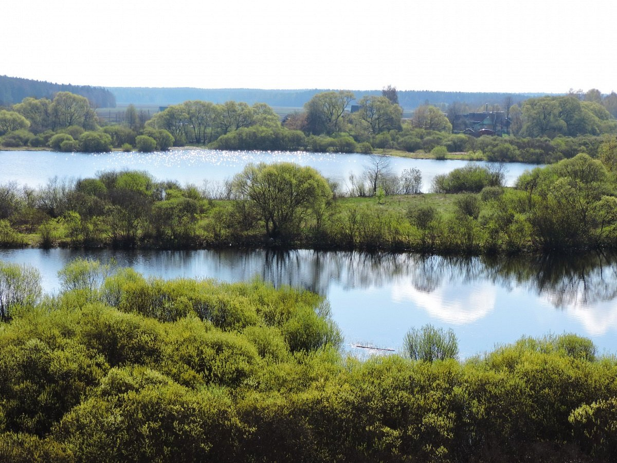 Разліў Бярэзіны